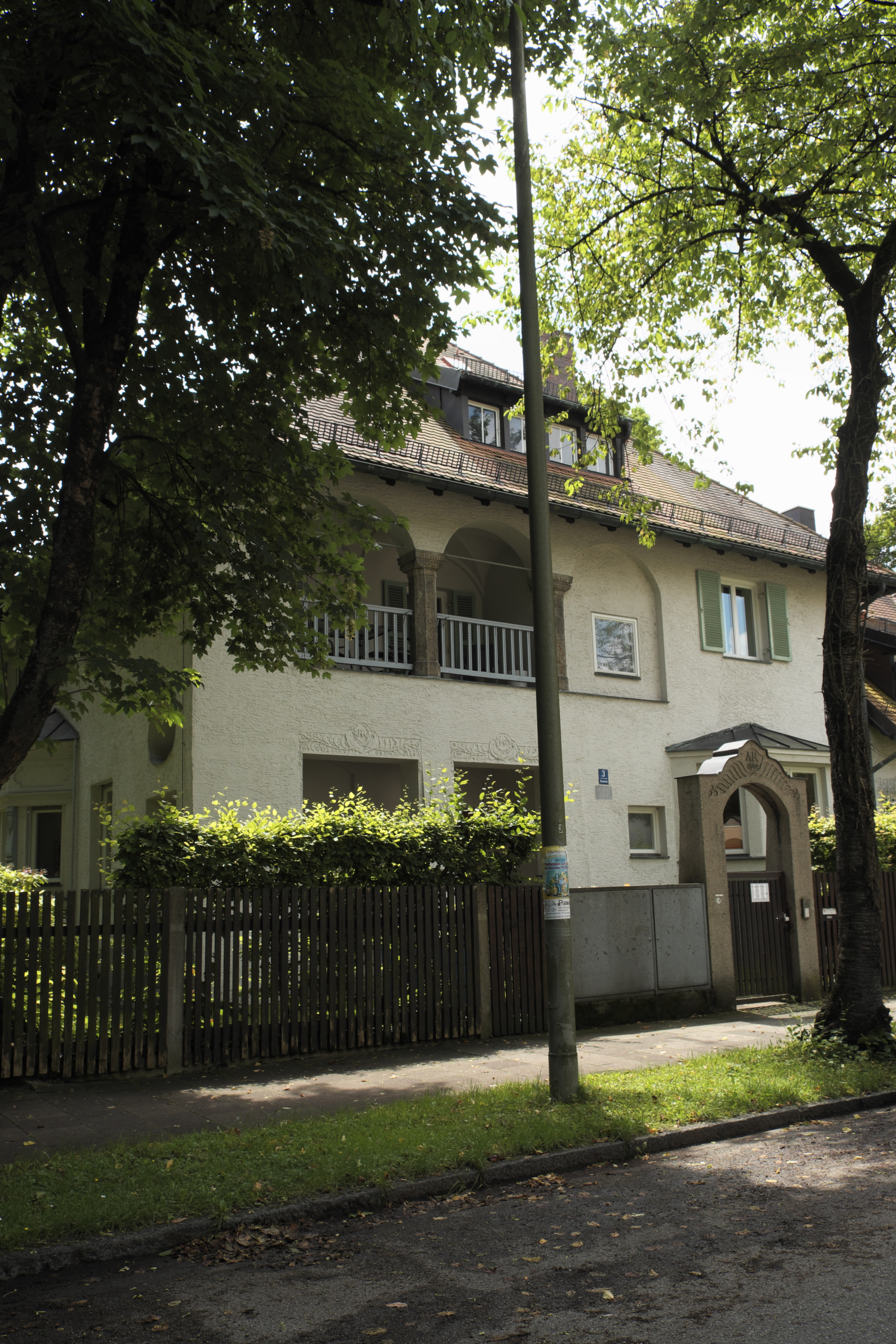 Marschnerstraße 3/3a in Pasing im Stadtbezirk Pasing-Obermenzing in München (Bayern/Deutschland)